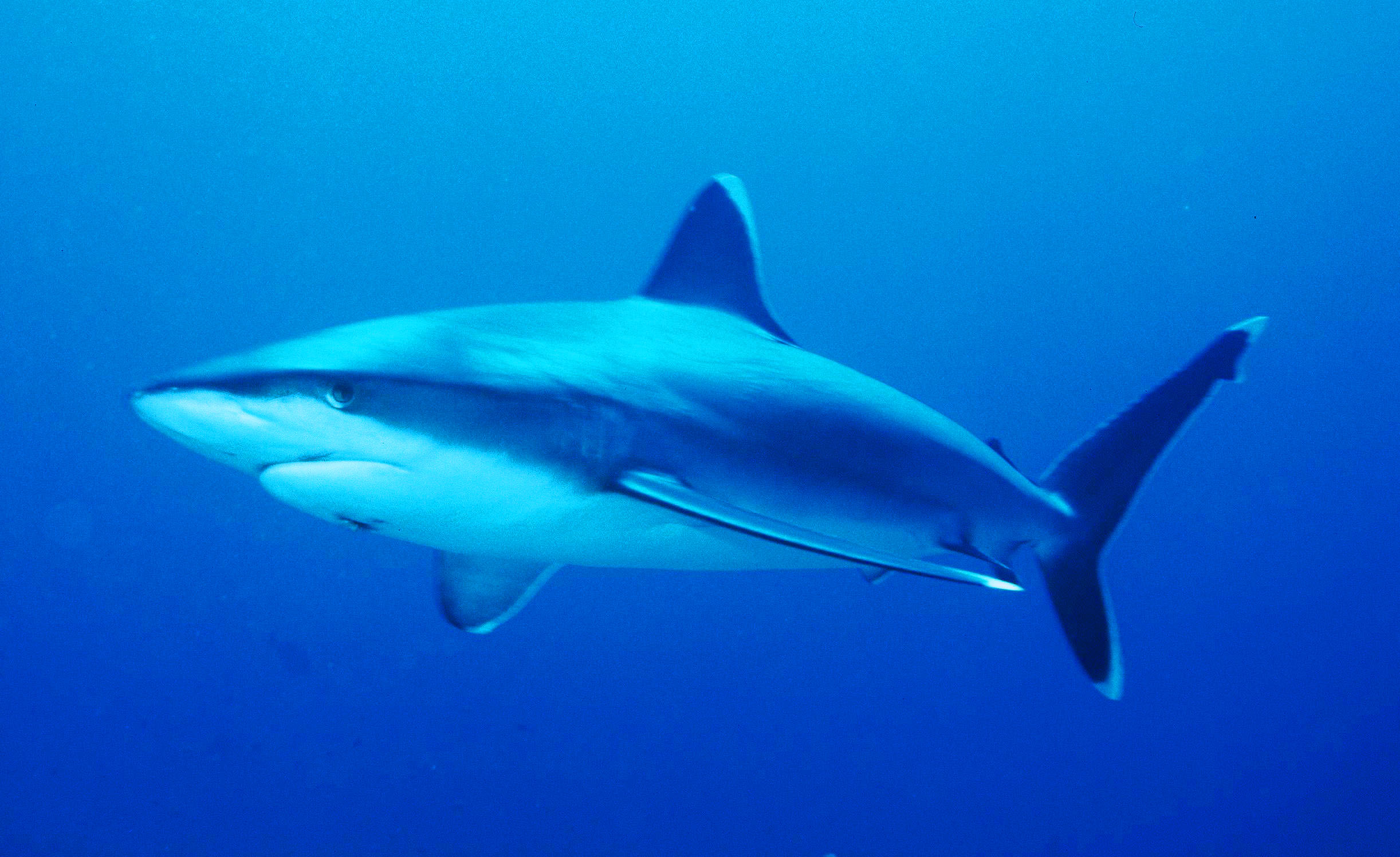 белоперая серая акула